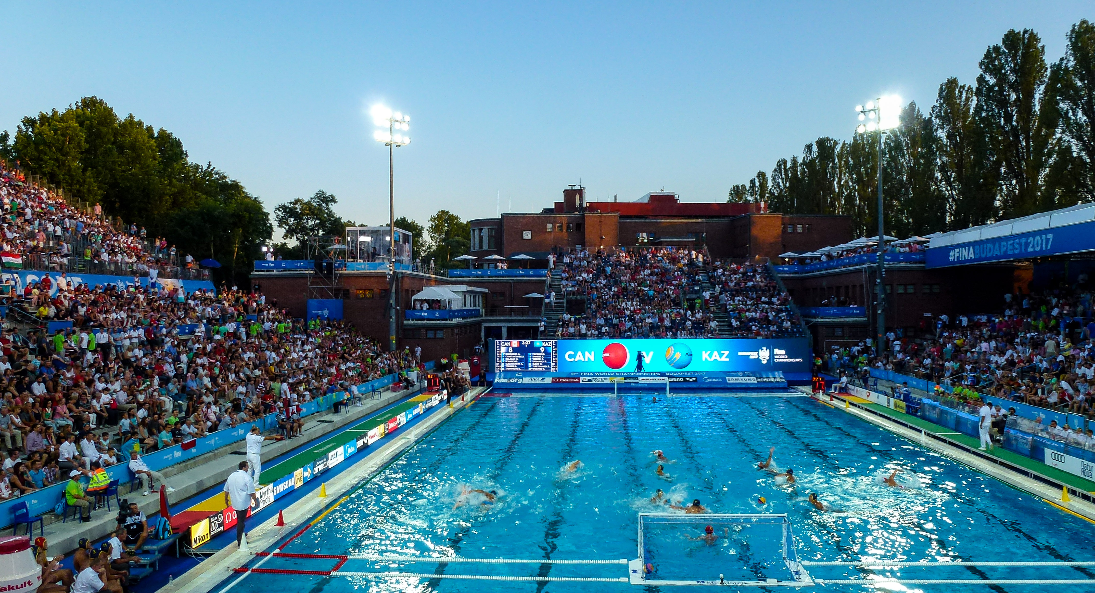 FINA WC 2017 Wasserball Vorrunde